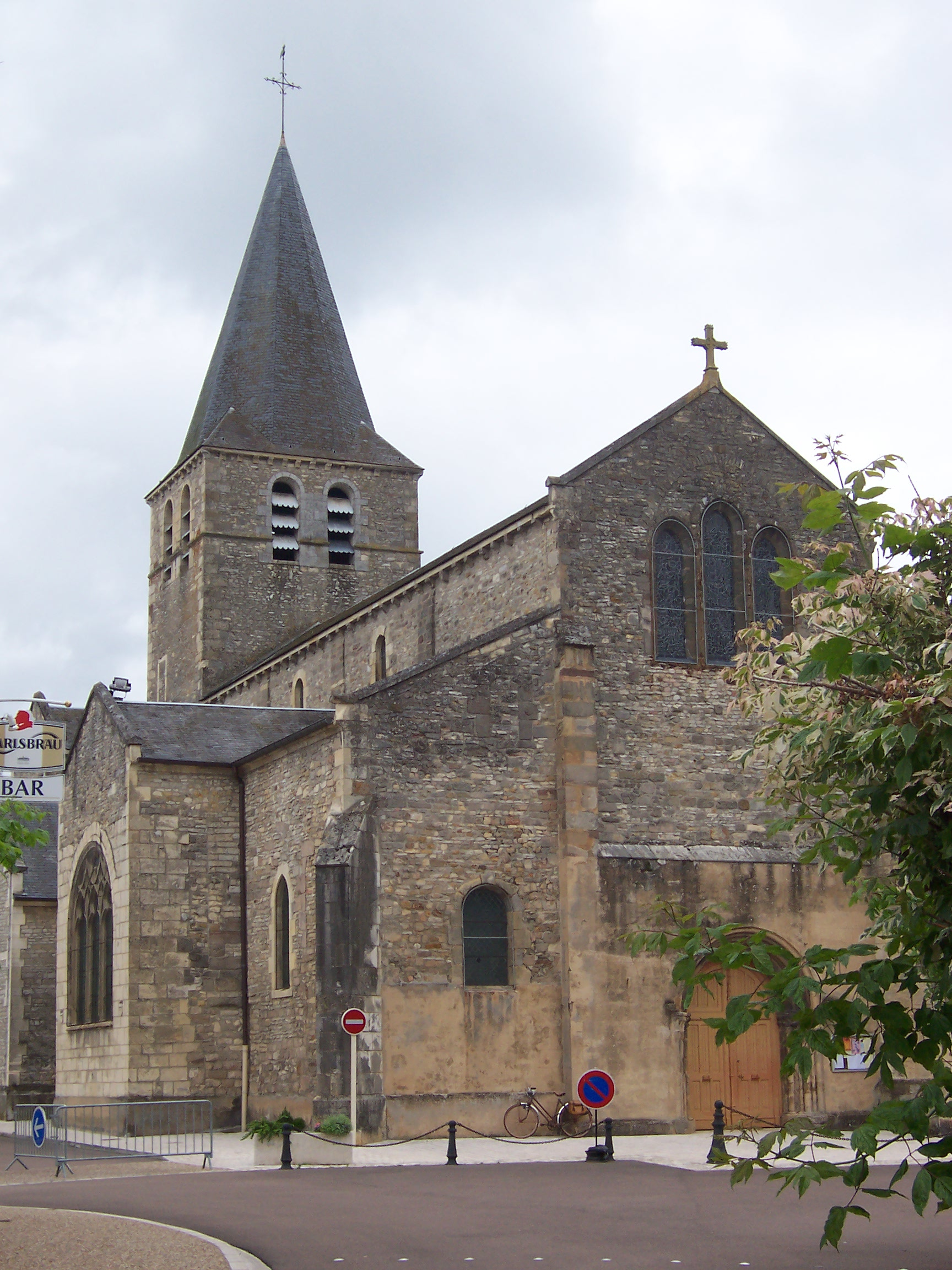 Church of Saint-Pierre-le-Moûtier (Nièvre)